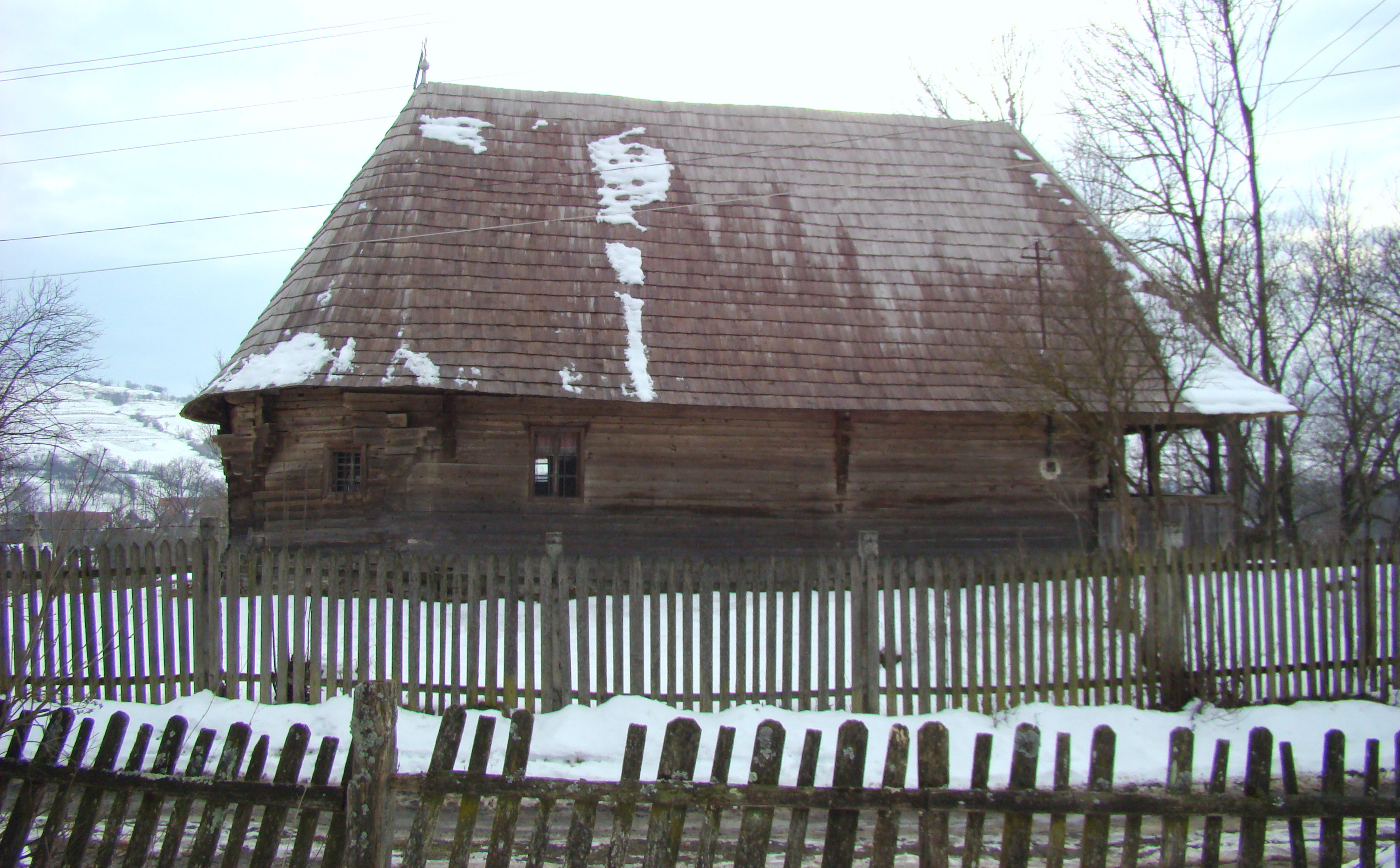 Urișiu de Jos, Mureș